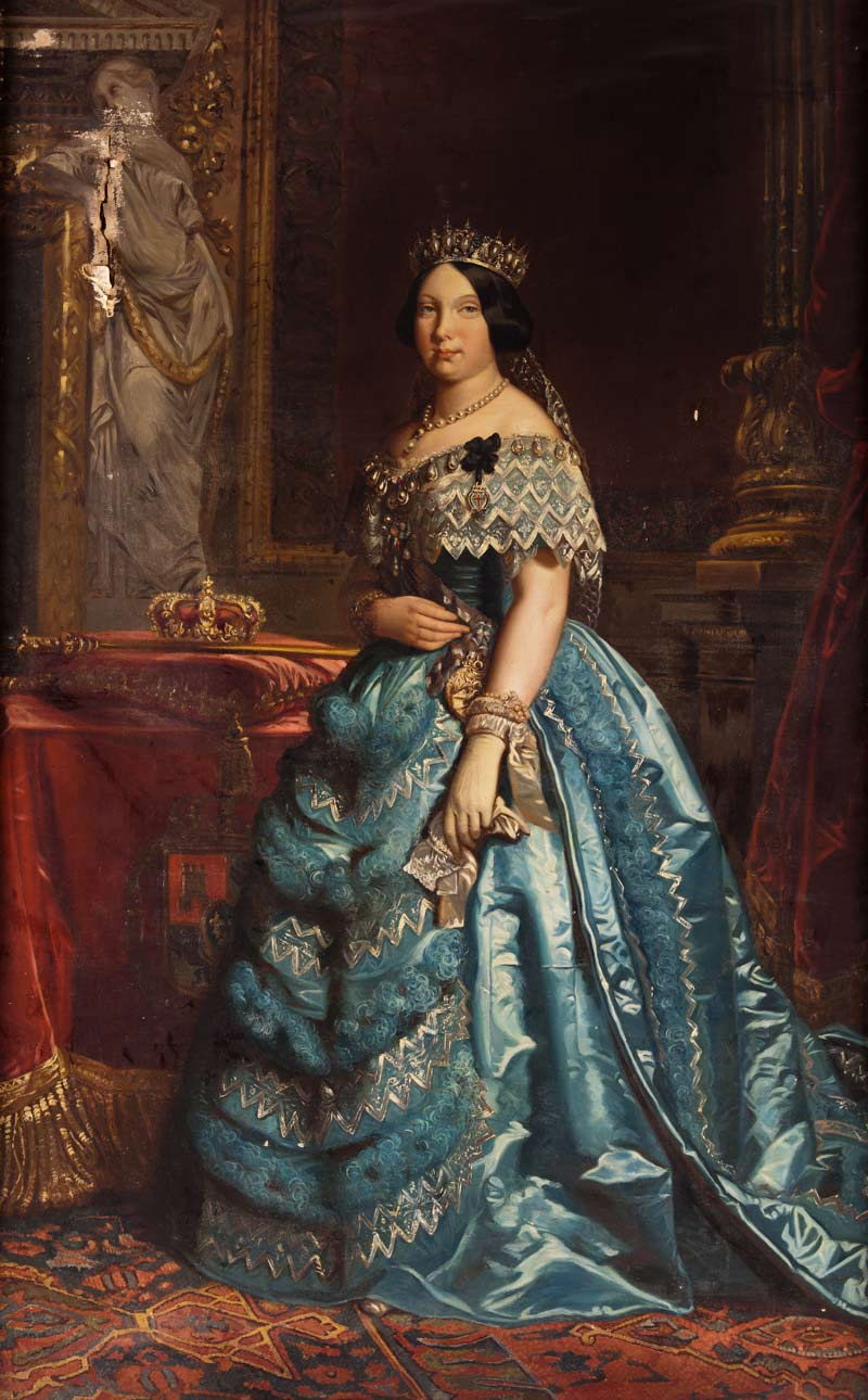 Retrato de la reina Isabel II de España (1830-1904), que aparece de cuerpo entero y con la banda de la Orden de Carlos III y la cruz de la Orden de las damas de la Cruz Estrellada. Copia del siglo XIX de un retrato atribuido a Madrazo que se conserva en el Teatro Real de Madrid.